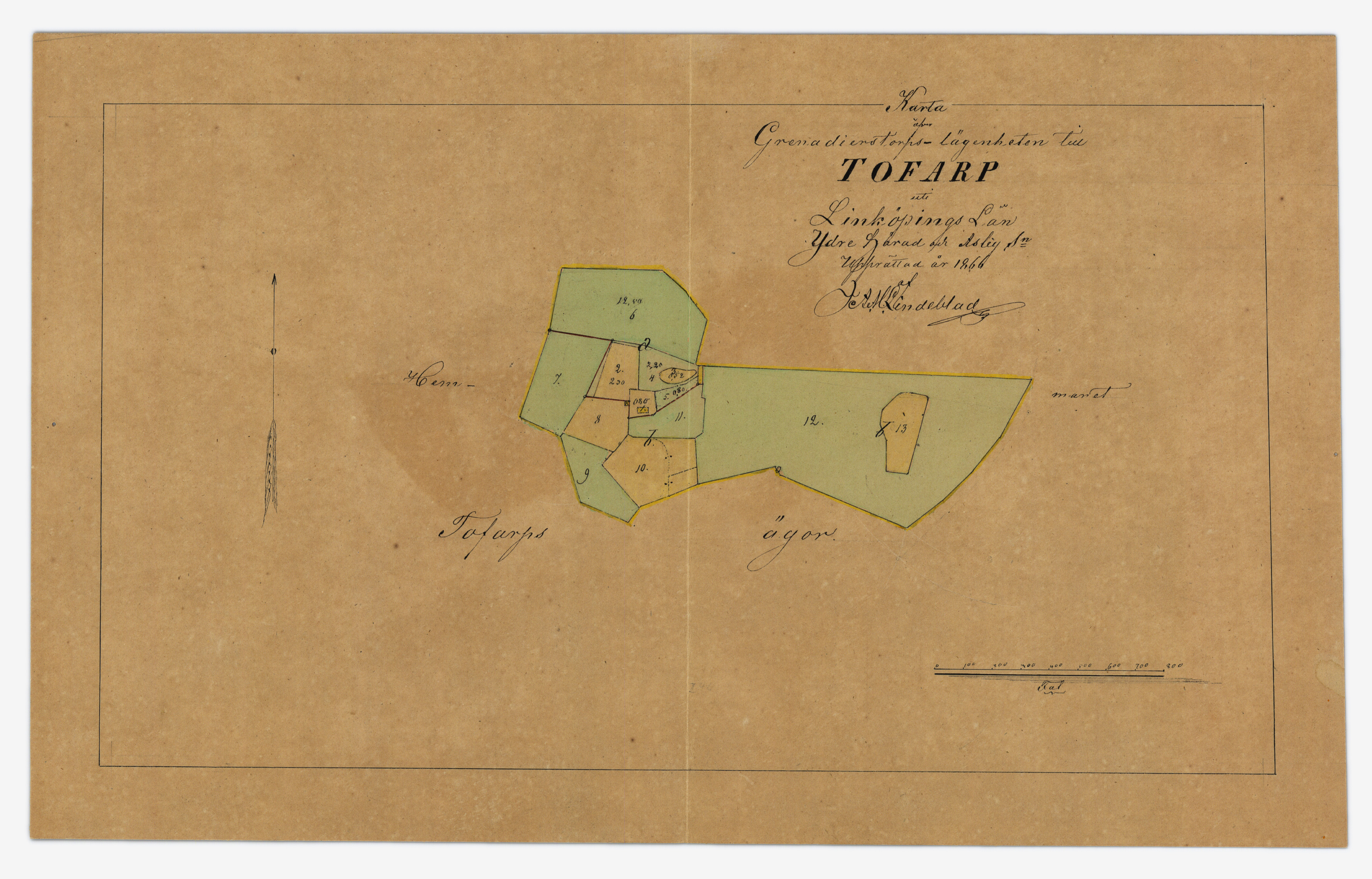 Karta över grenadjärtorpet i Tovarp, Ydre, Östergötland från år 1866.